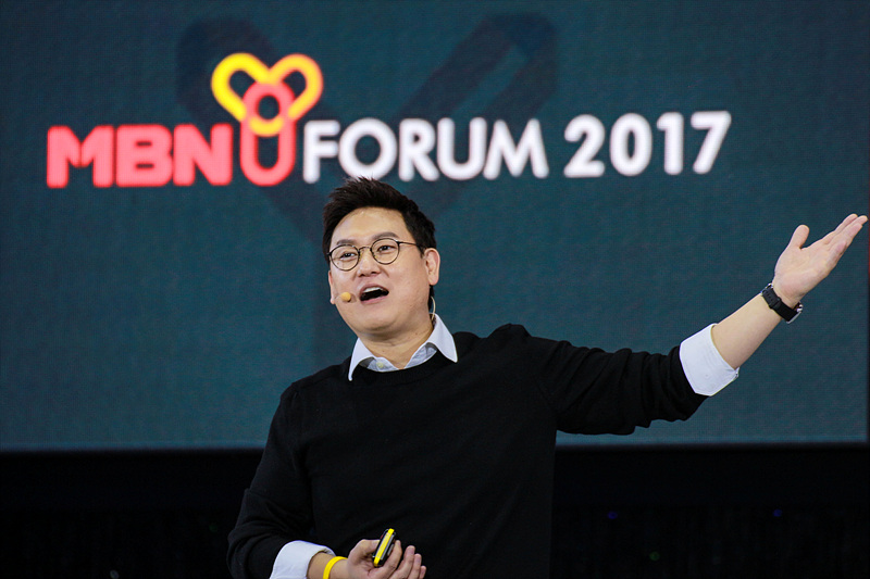 2017 02월 22일 MBN Y Forum 2017 데니스 홍 UCLA 교수